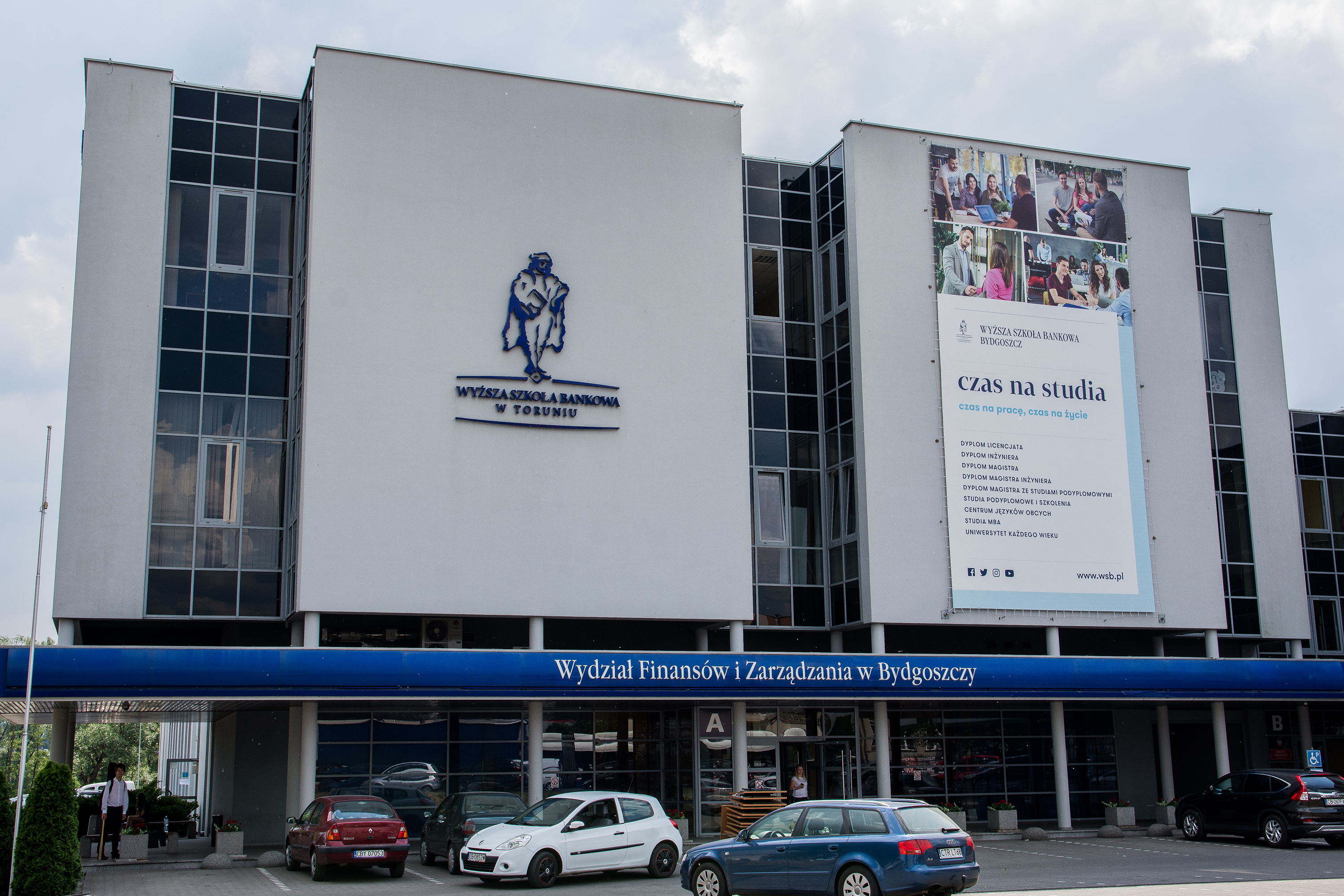 Budynek uczelni